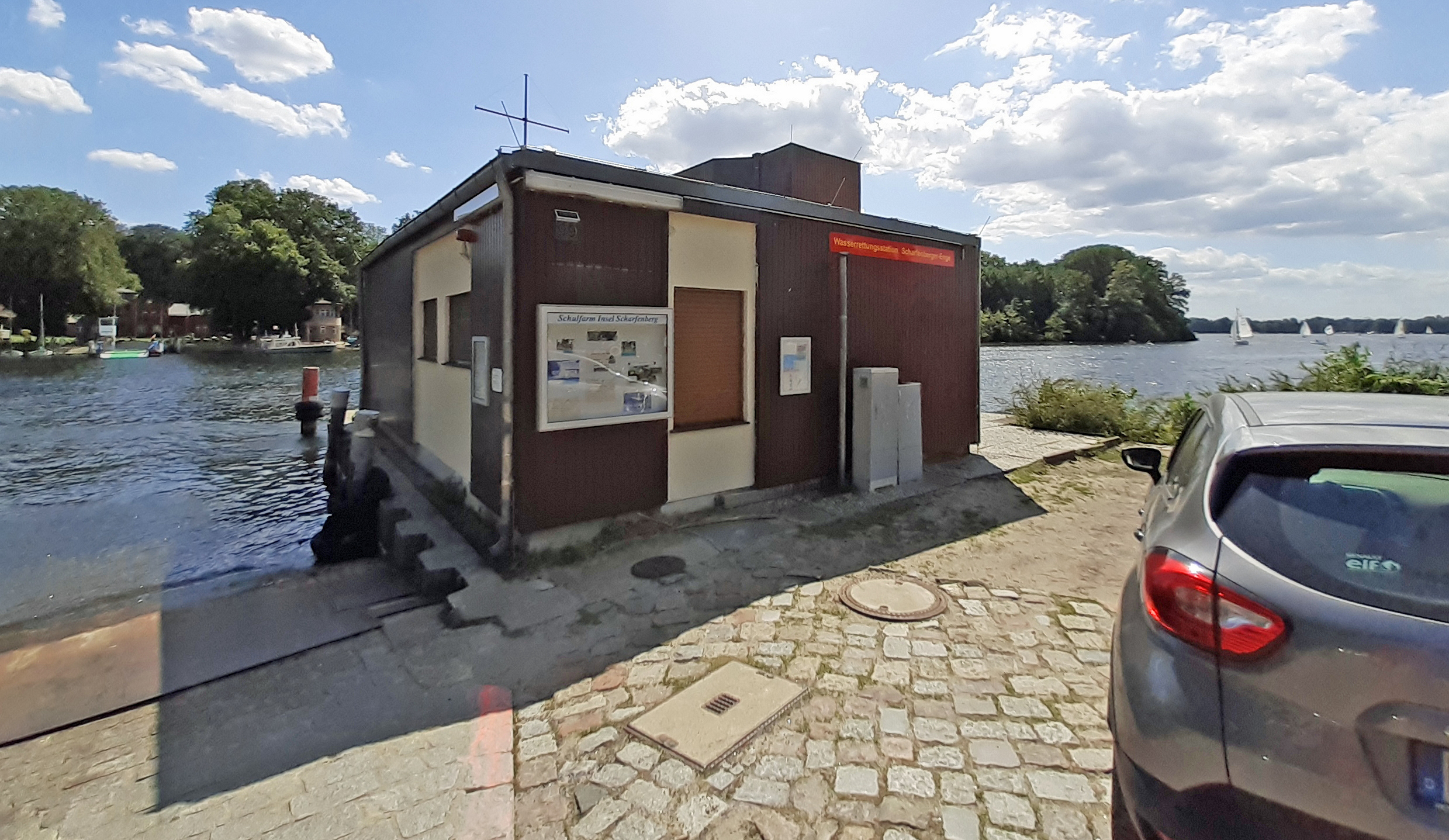 Neben der Rettungsstation Scharfenberg befindet sich die Fährverbindung zur Schulfarminsel Scharfenberg. Diese Fähre dient zur Verbindung des Internates auf der Insel Scharfenberg mit dem Festland an Werktagen.